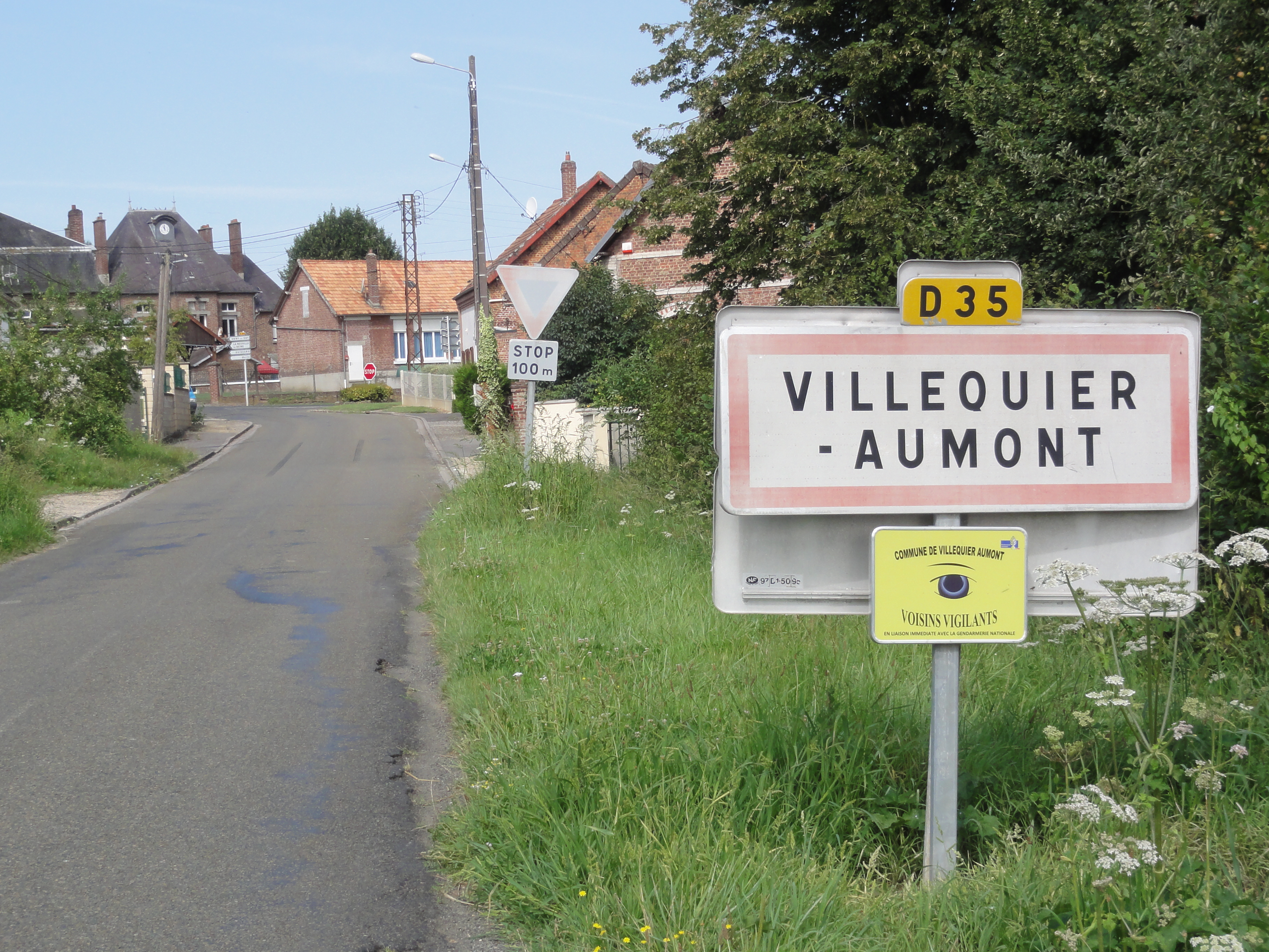 Villequier-Aumont (Aisne) city limit sign